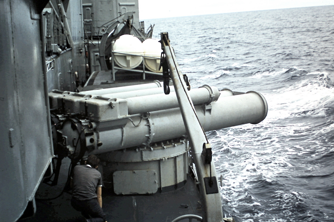 Lancement d'une torpille L3 d'exercice à bord de l'escorteur d'escadre Kersaint en 1970 - orientation